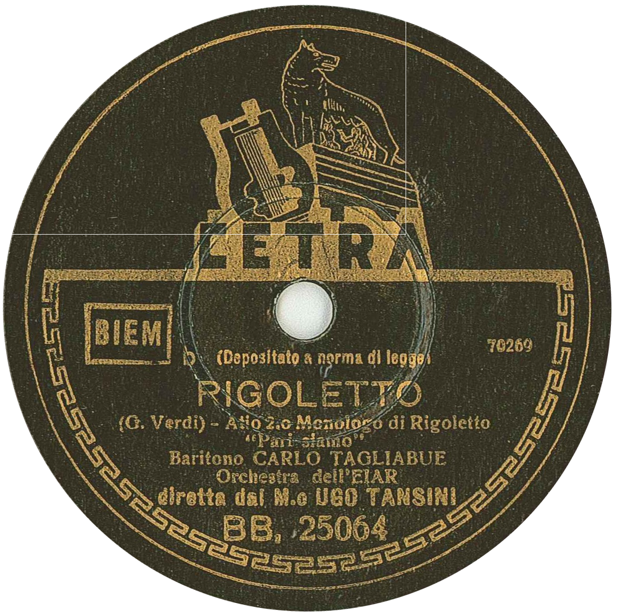 etichetta di un 78 giri